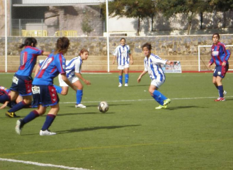 Partido de la Superliga Femenenina entre Sp. Huelva y Levante UD, temporada 2006-2007